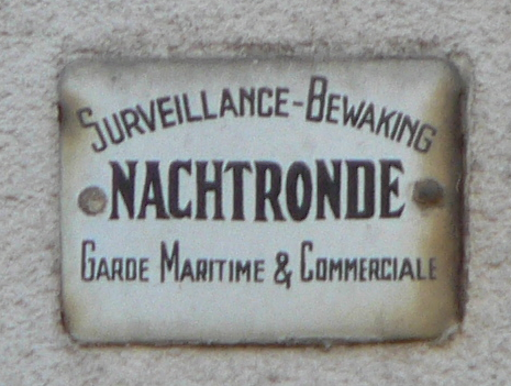 Cogels-Osylei 24 Berchem (Antwerpen)